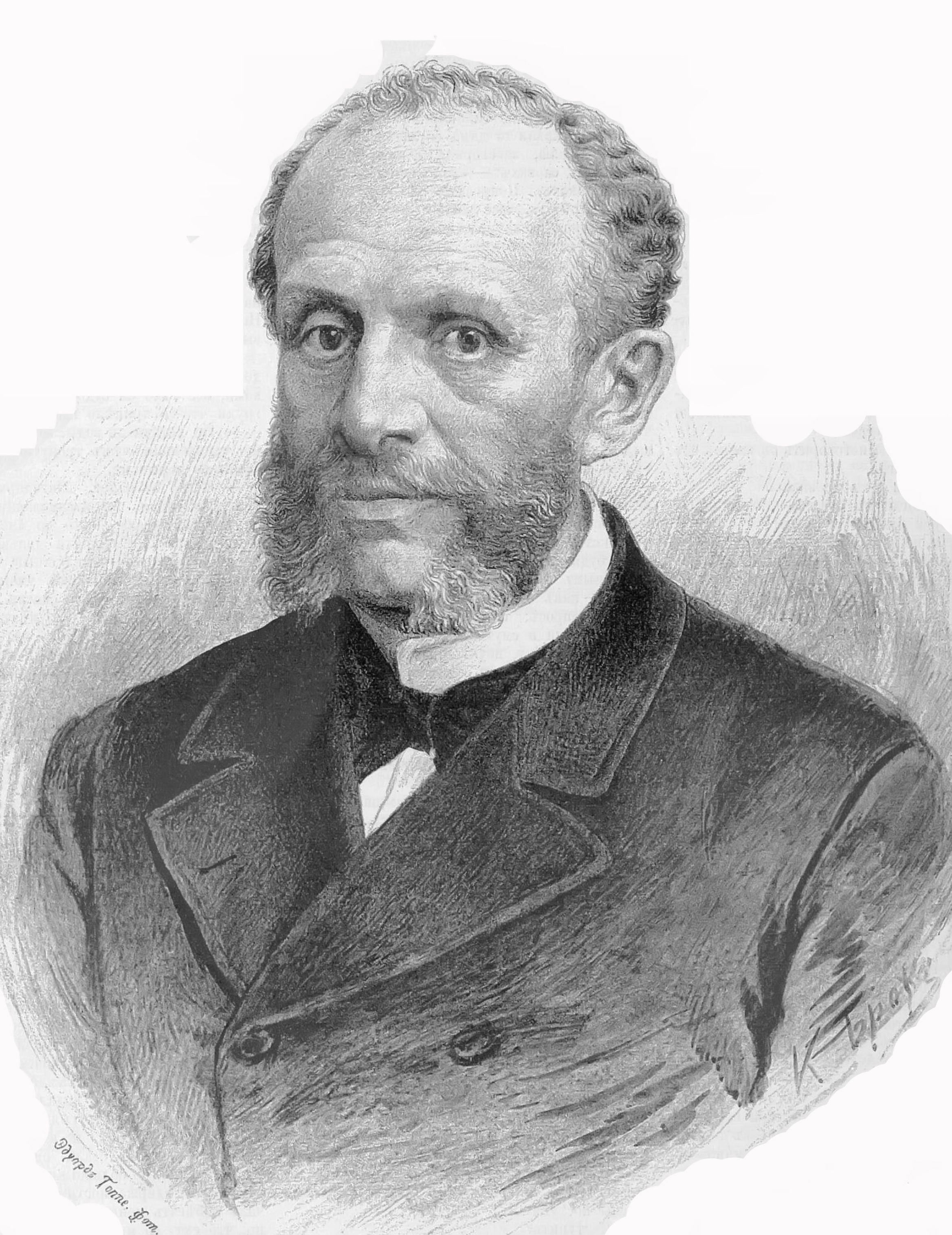 Гирс Николай Карлович, 1888 год